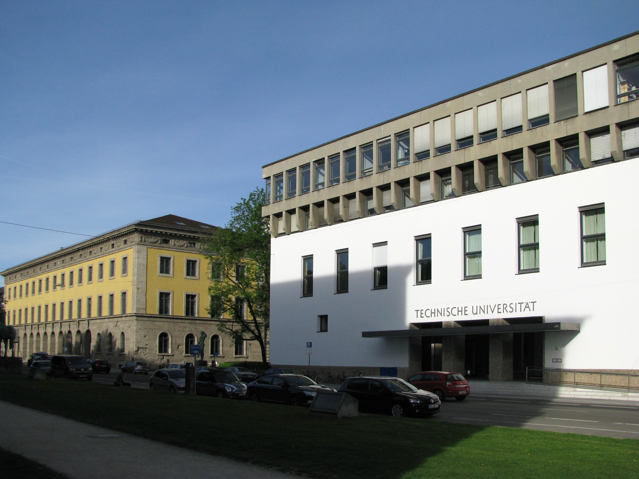 Technische Universität München, Haupteingang an der Arcisstraße